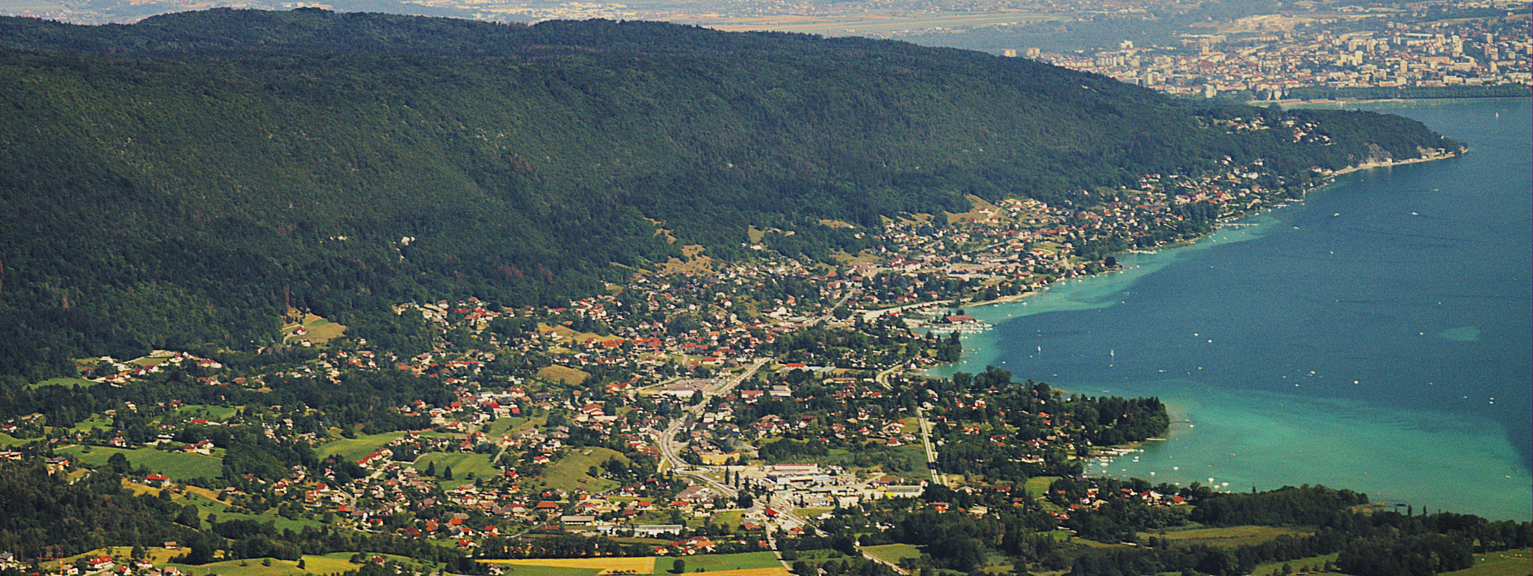 L'ensemble de la commune de Sevrier depuis le col de la Cochette.